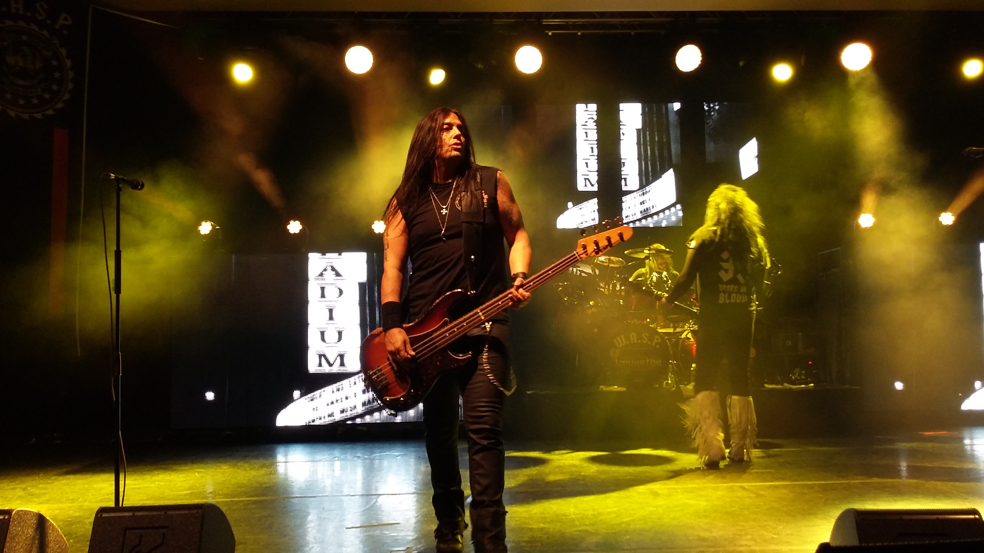 Mike Duda, Helsinki 9.10.2015.